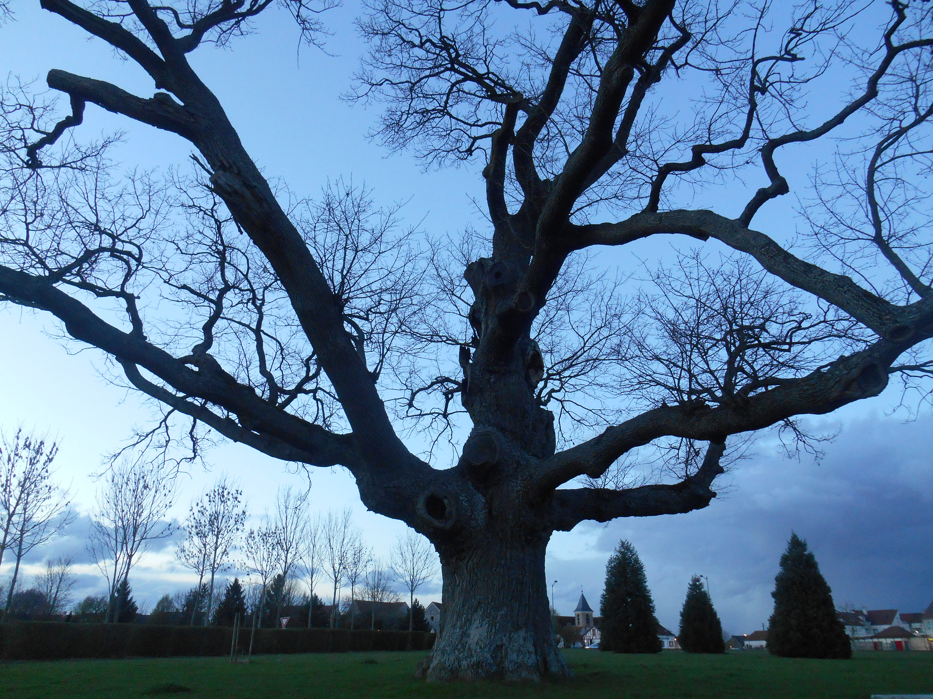 Chêne remarquable à Chessy (Seine-et-Marne, France).